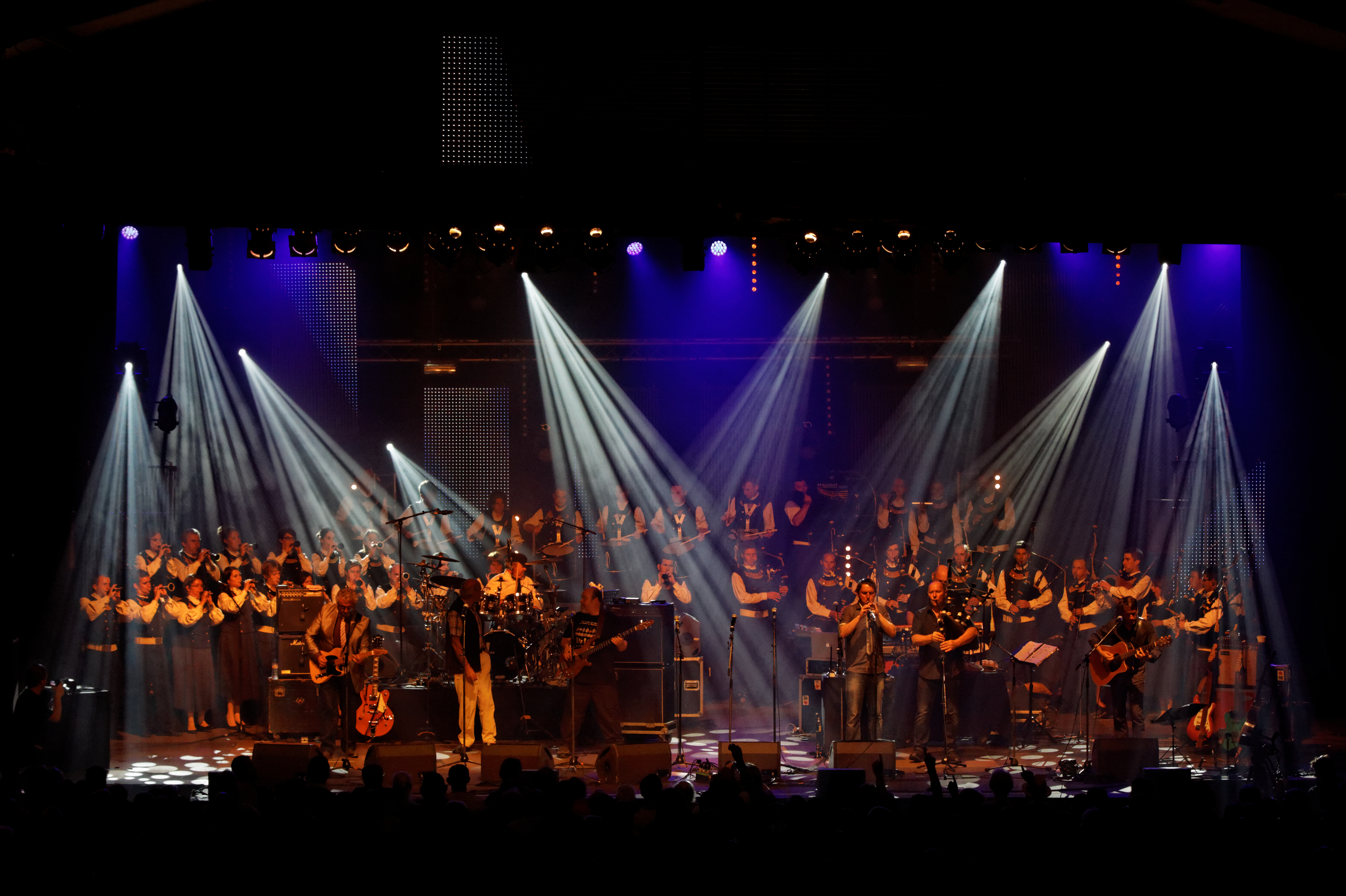 Les Sonerien Du fêtent leurs 40 ans en concert à l'espace Gradlon lors du festival de Cornouaille 2012. Le bagad Penhars & Co accompagne les Sonerien sur scène.